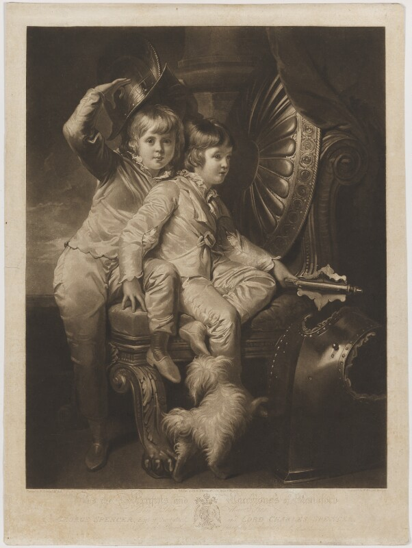 George Spencer-Churchill (1793-1857), 6th Duke of Marlborough when Earl of Sunderland; Charles Spencer-Churchill (1794-1840)